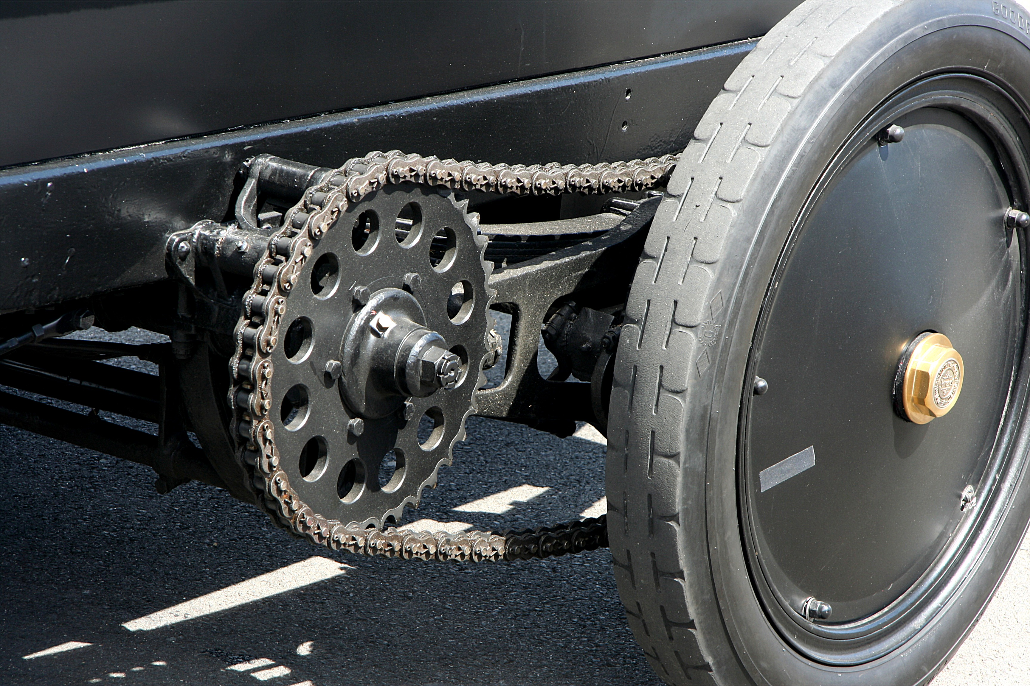 Brutus – Experimentalfahrzeug des Technikmuseums Sinsheim